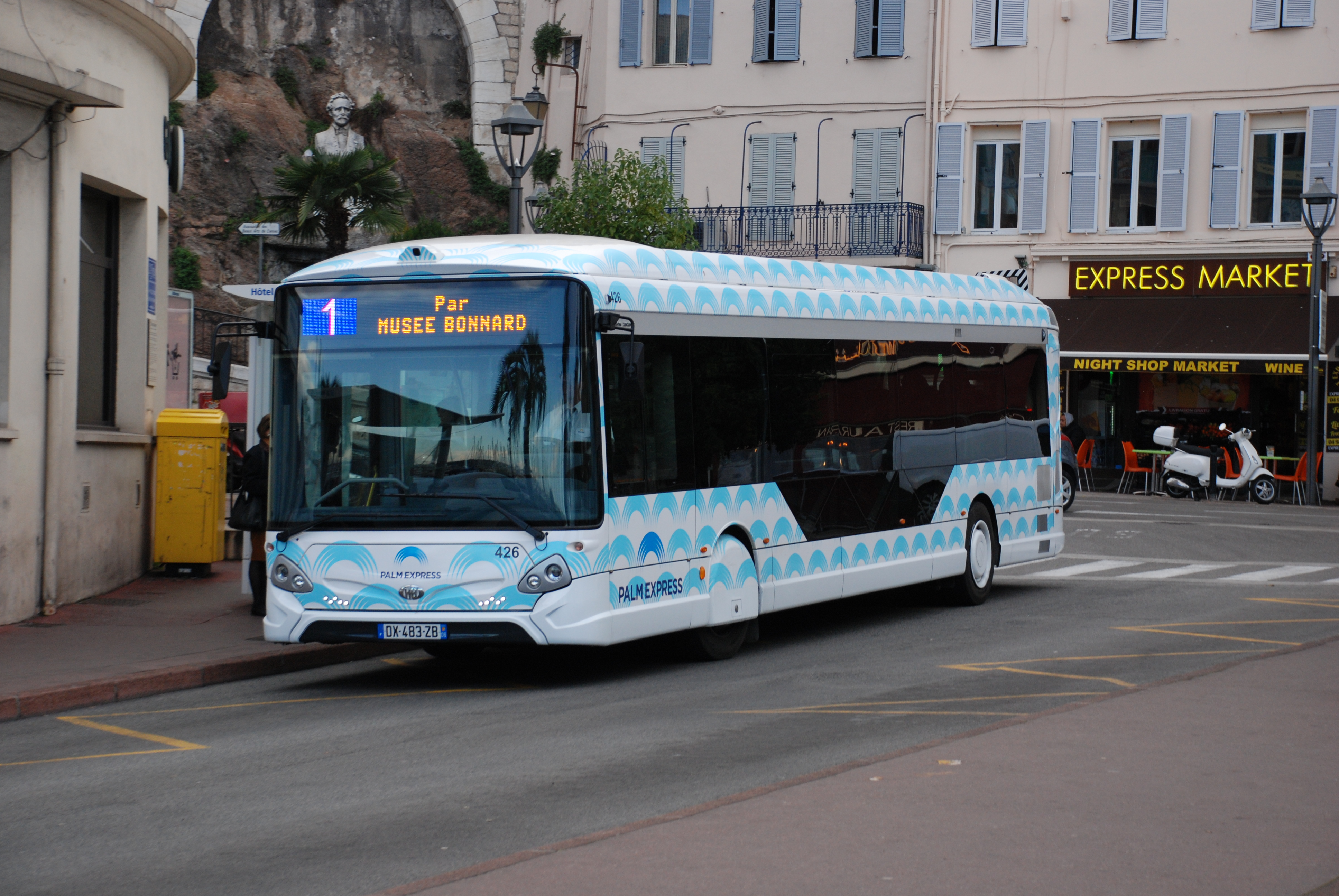 GX337BHNS n°426 à la Gare Routière.